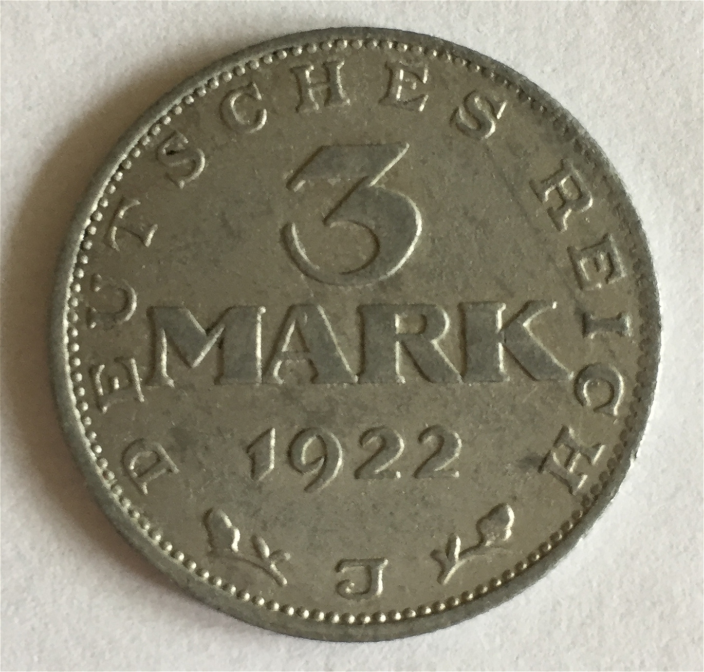 Münze Weimarer Republik 1922 - Verfassungstag 11.08.1922